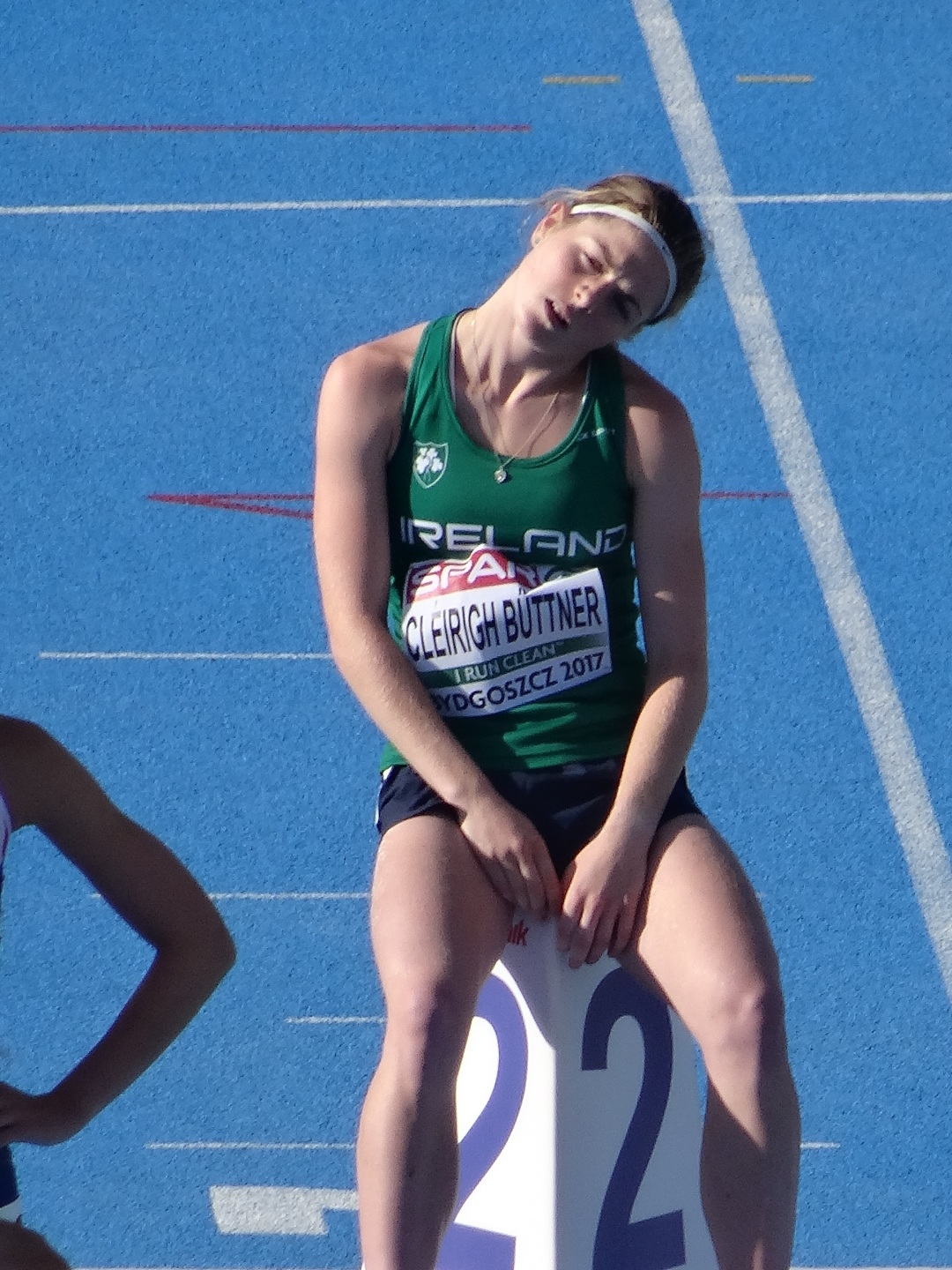 Młodzieżowe Mistrzostwa Europy w Lekkoatletyce U23 w Bydgoszczy 13-16 lipca 2017, kwalifikacje biegu na 800 m kobiet